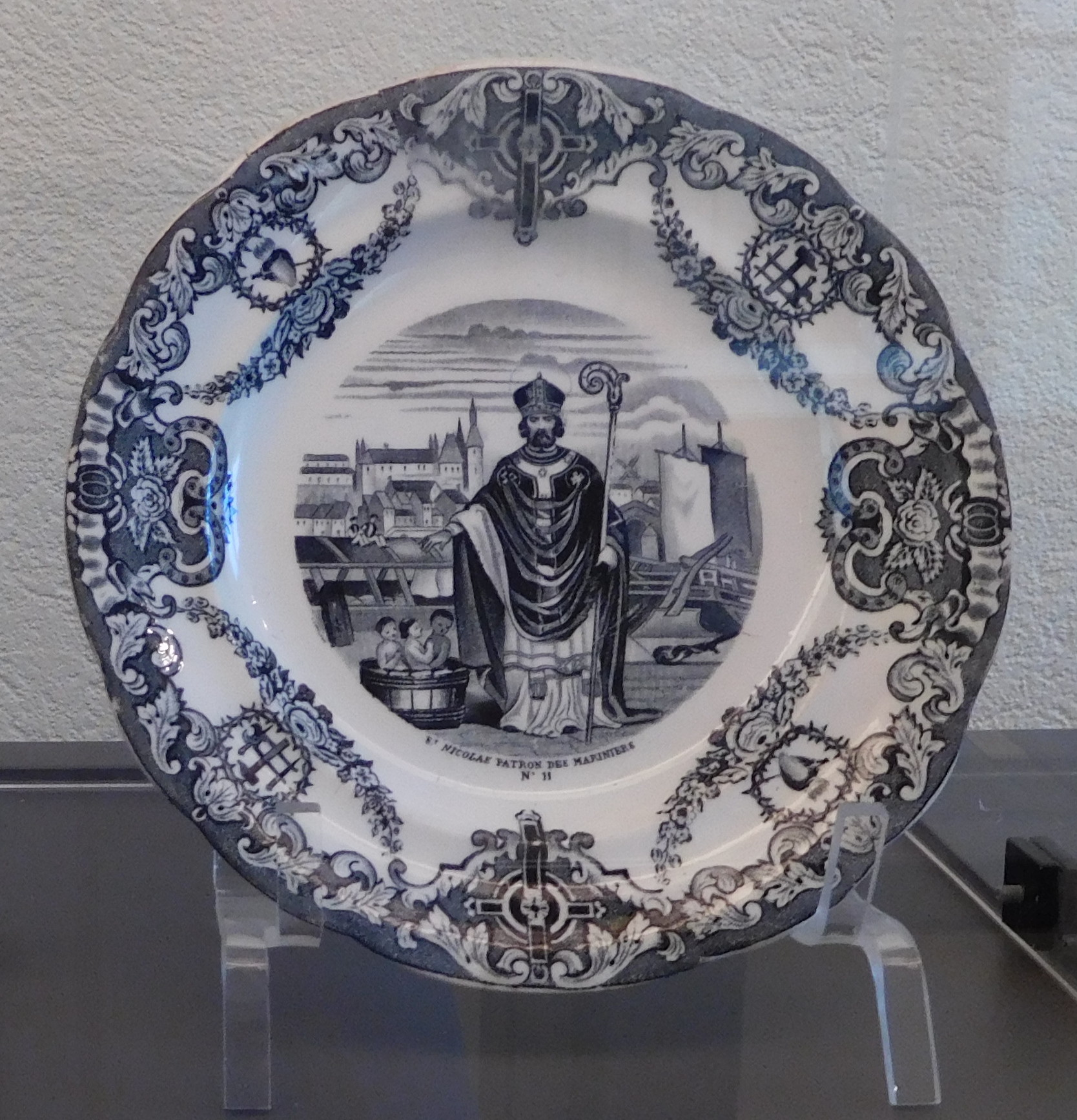 (Texte de la fiche du musée :) Assiette « Saint Nicolas »